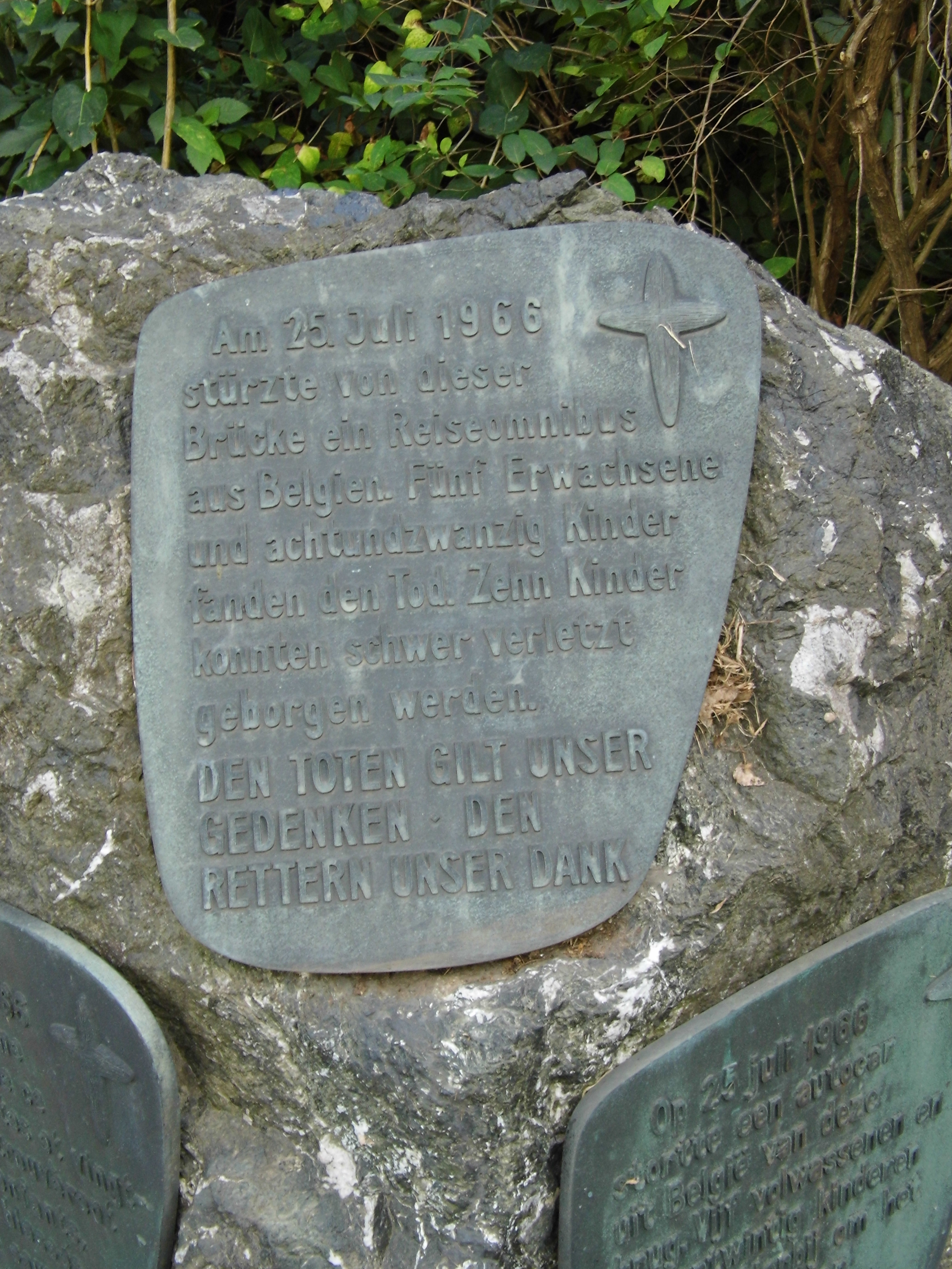 Werschau, Gedenkstein Busunglück 1966, Detail